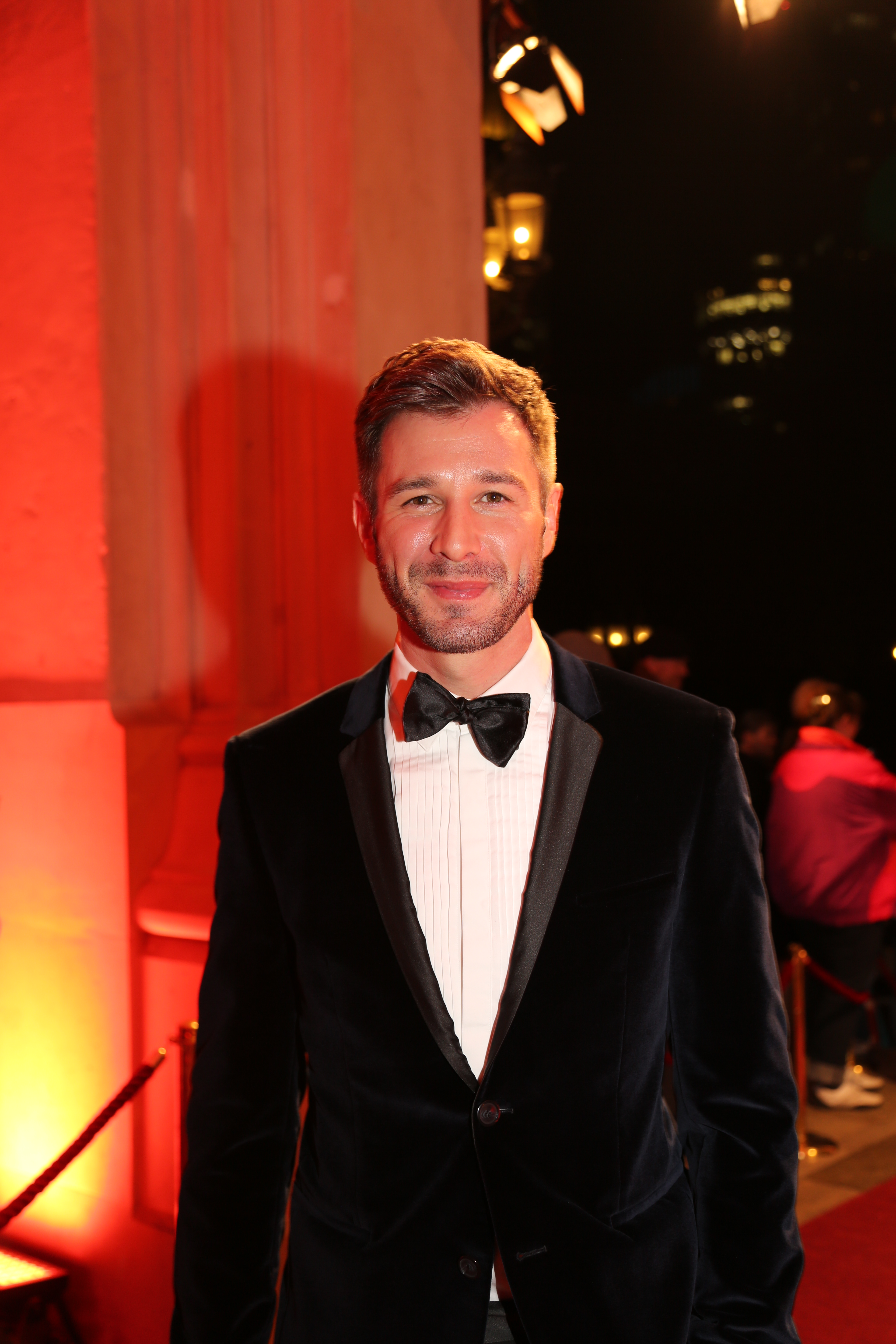 Jochen Schropp beim Hessischen Film- und Kinopreis 2016